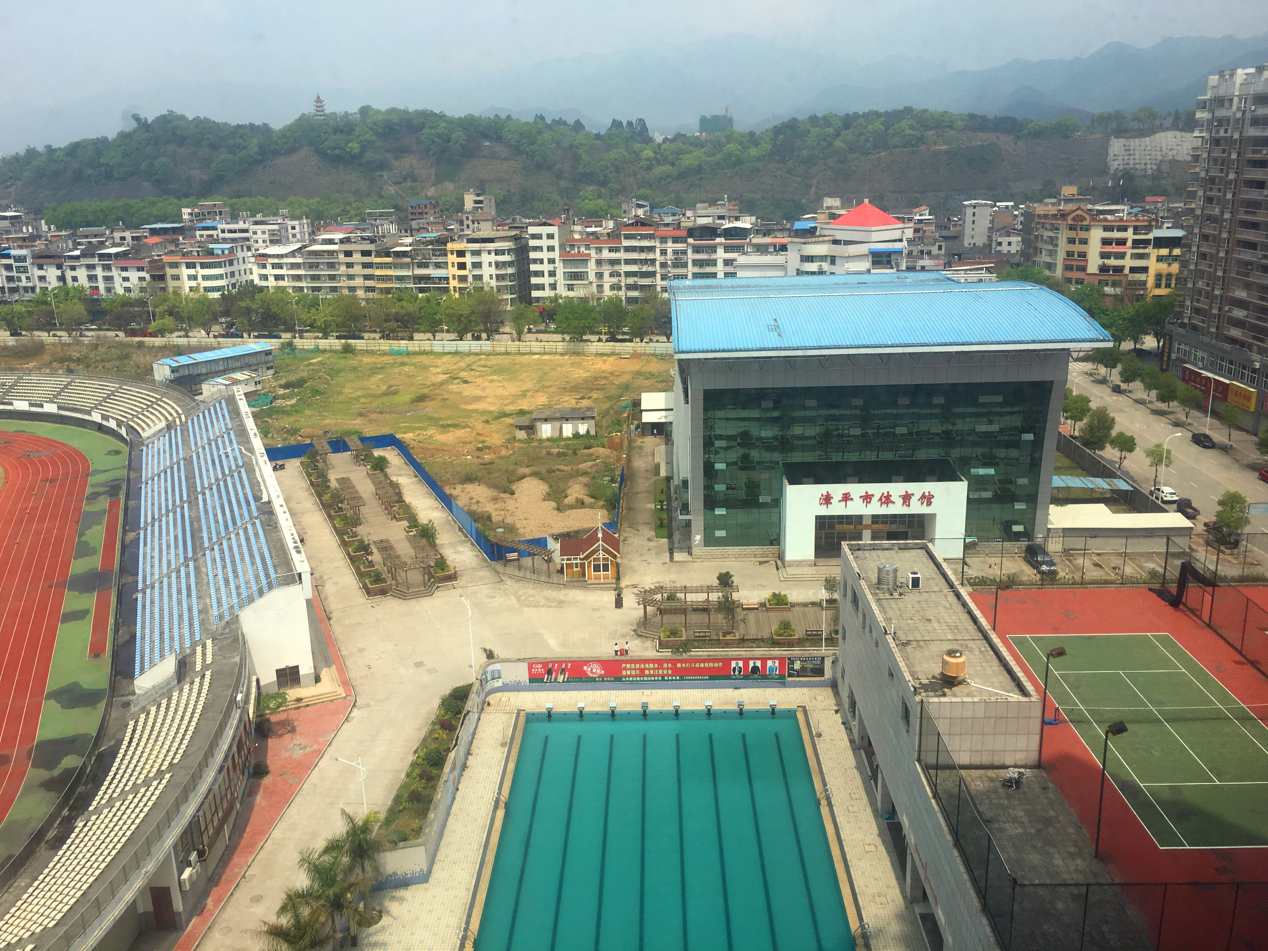 漳平市体育馆